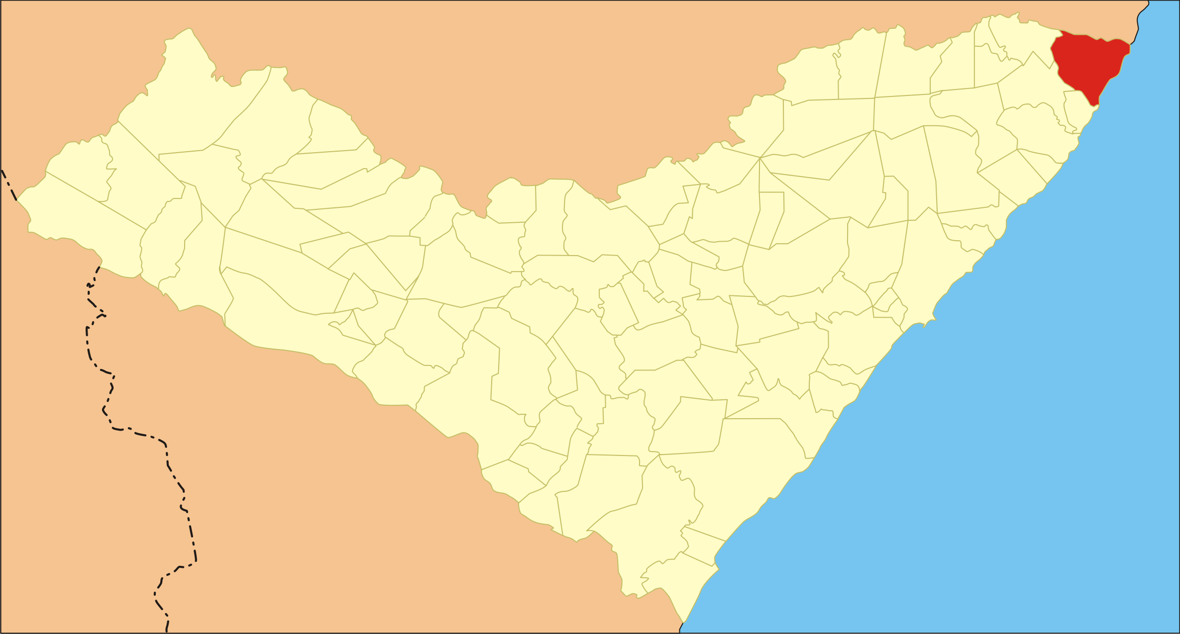 Localização da cidade no estado de Alagoas.